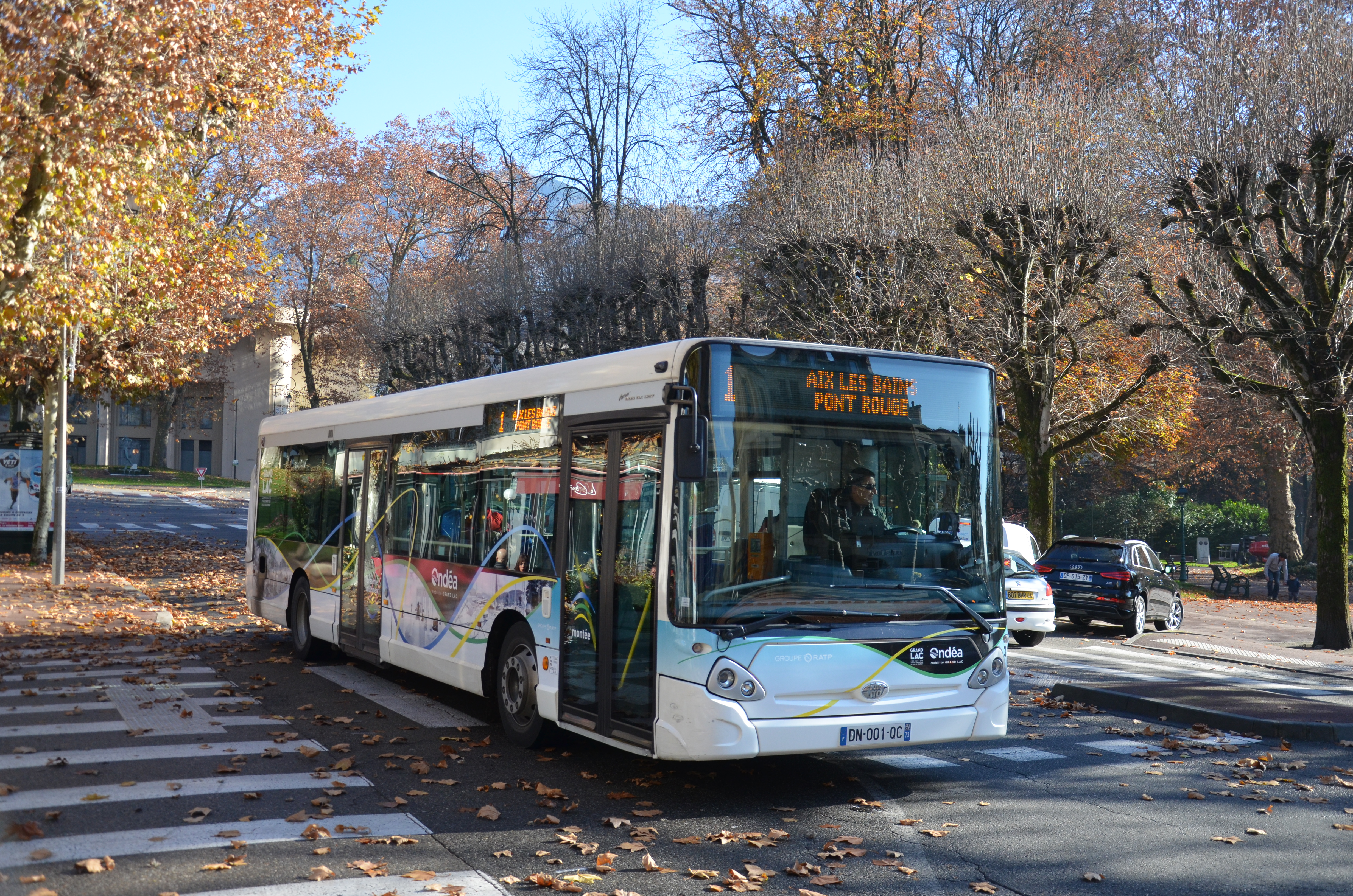 Heuliez GX 327 n°31 sur la ligne 1 du réseau ONDEA d'Aix-les-Bains, près de l'hôtel de ville.